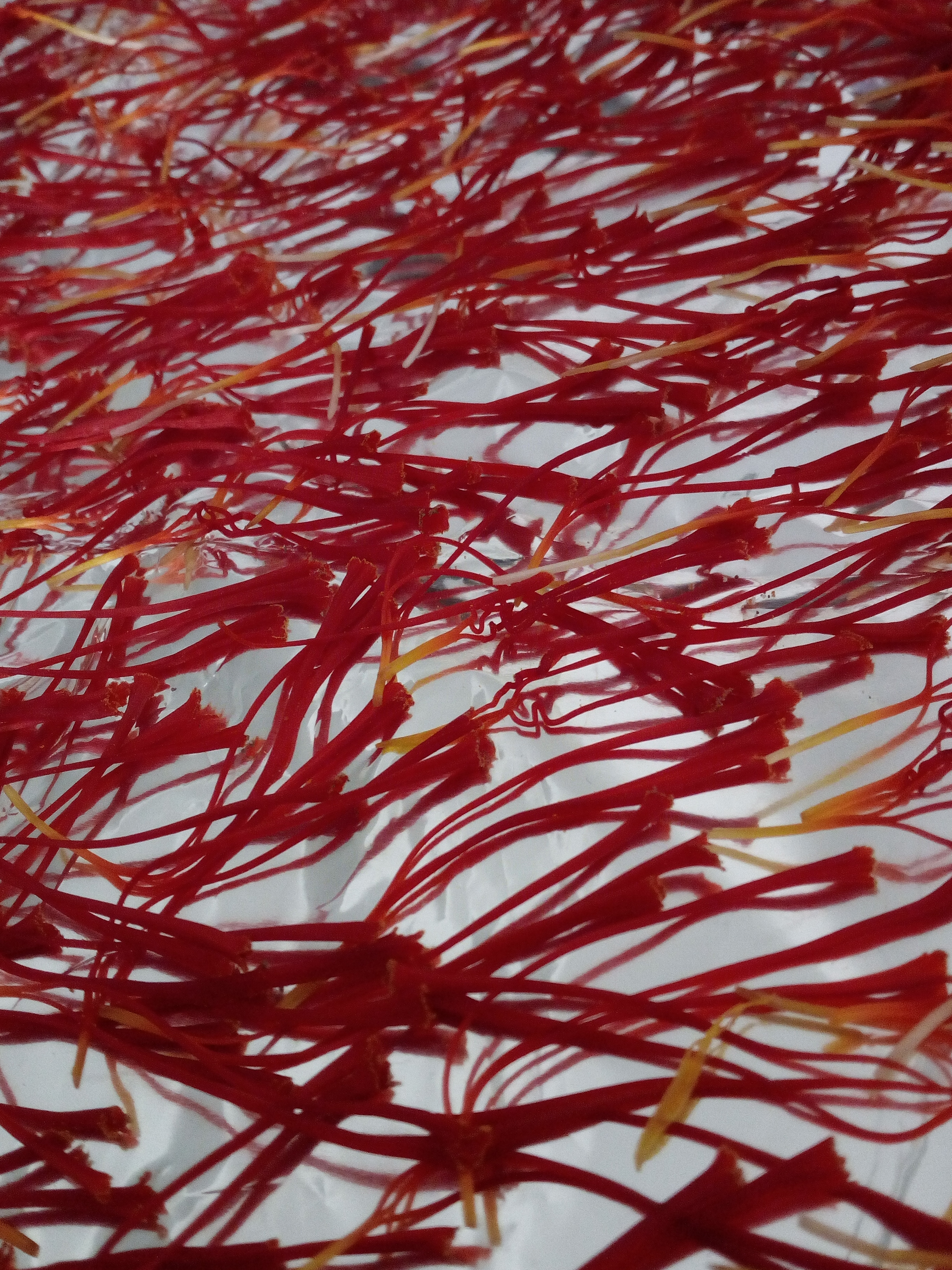 Pistilli di zafferano